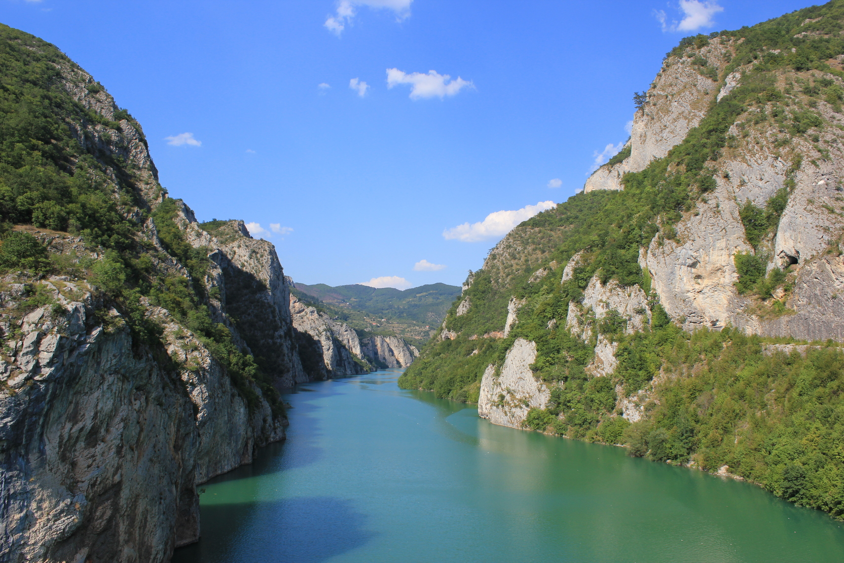 Der Canyon der Drina südlich von Višegrad, Ostbosnien.Hornjoserbsce: Wudrjeńca rěki Drina južnje Višegrada we wuchodnej Bosniskej.